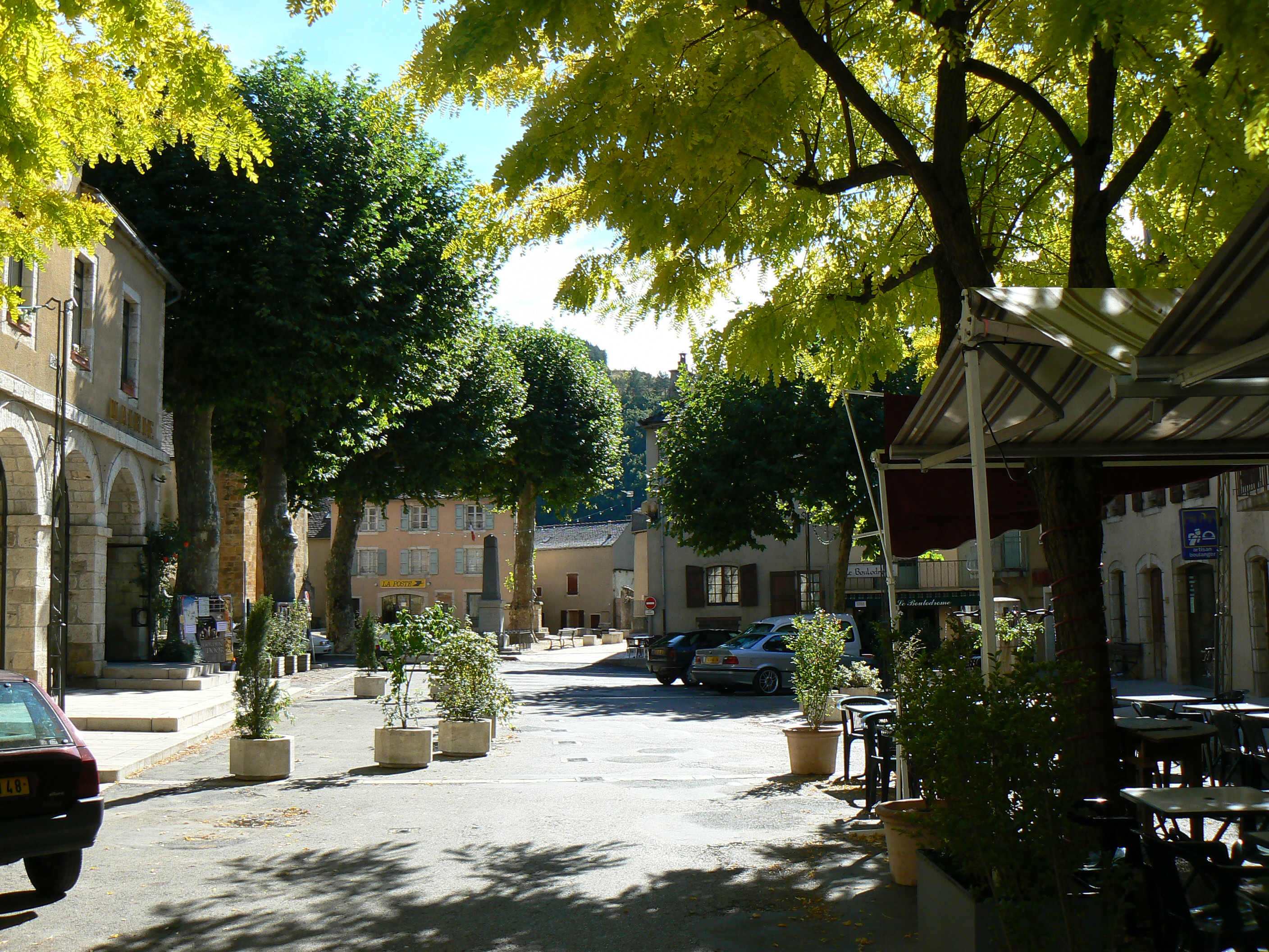 Centre-ville d'Ispagnac en Lozère